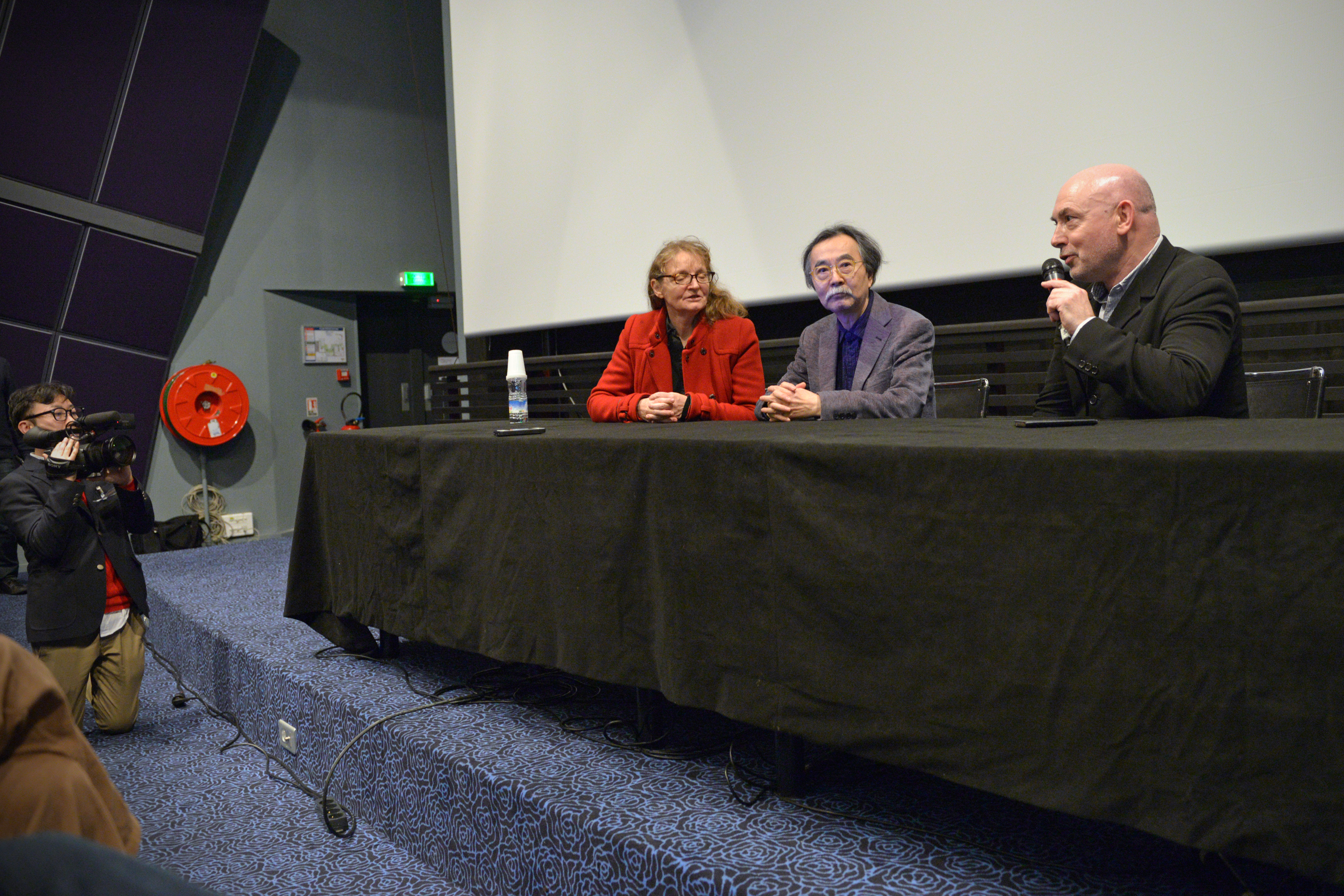 Jiro Taniguchi au Festival International de la BD d'Angoulême 2015.